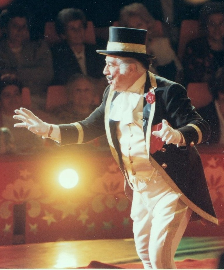 Mucsi Sándor (1926-2006) cirkuszigazgatóként a Cirkuszhercegnő című operettben, Fővárosi Nagycirkusz